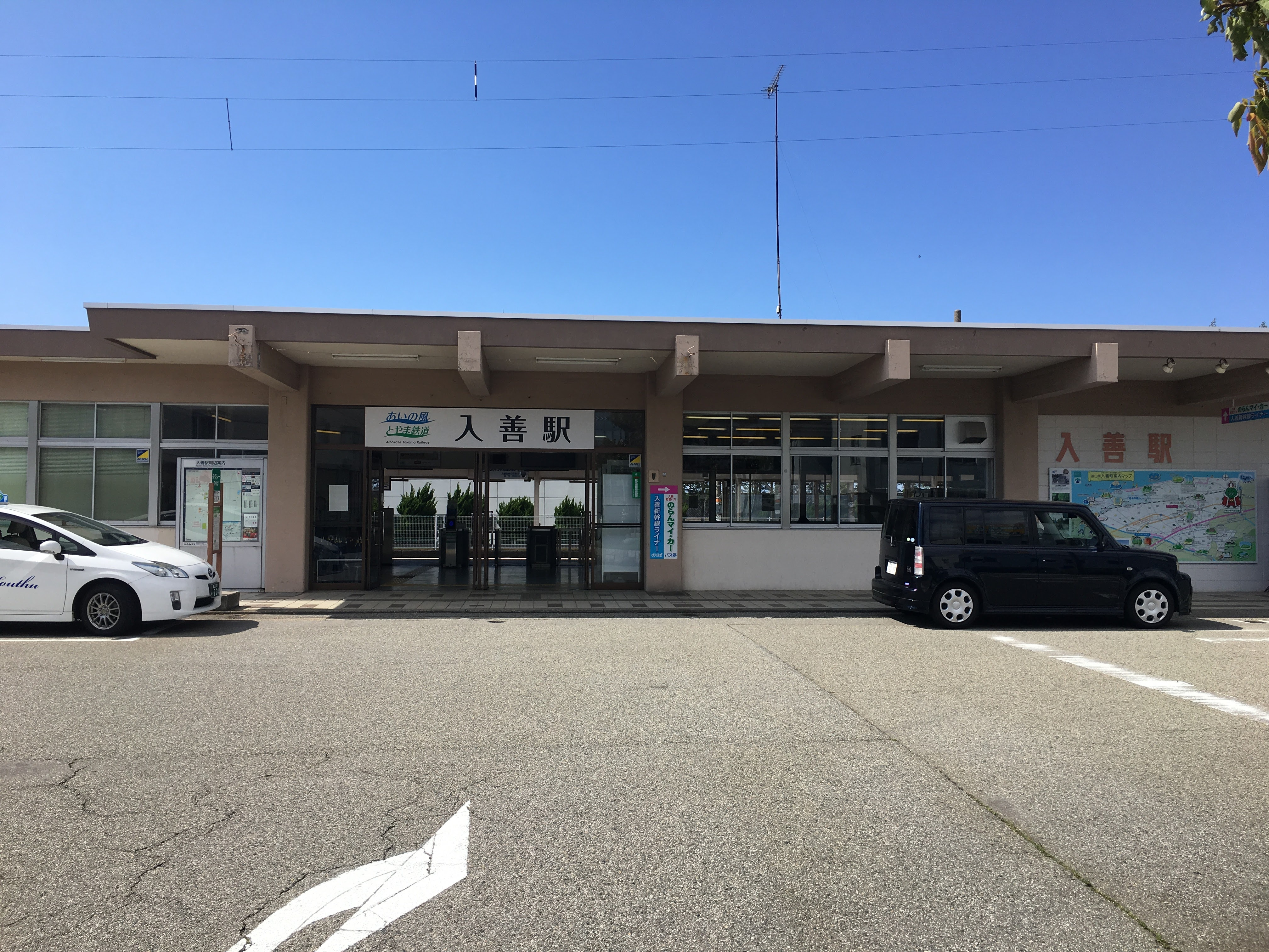 入善駅駅舎